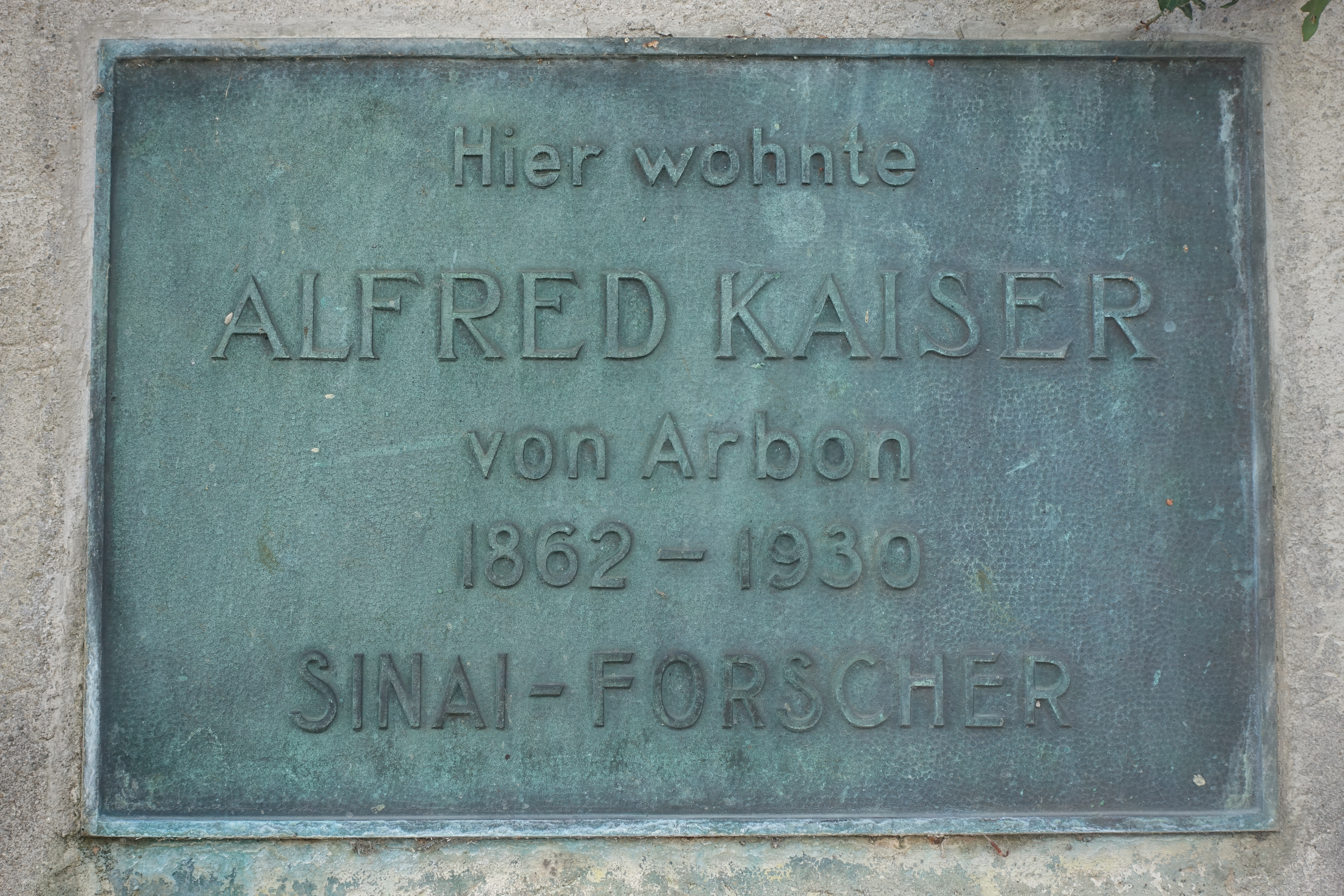 Hinweistafel für Alfred Kaiser (1868-1930),Sinai-Forscher, eingelassen in der Mauer der Liegenschaft Berglistrasse 11, Arbon